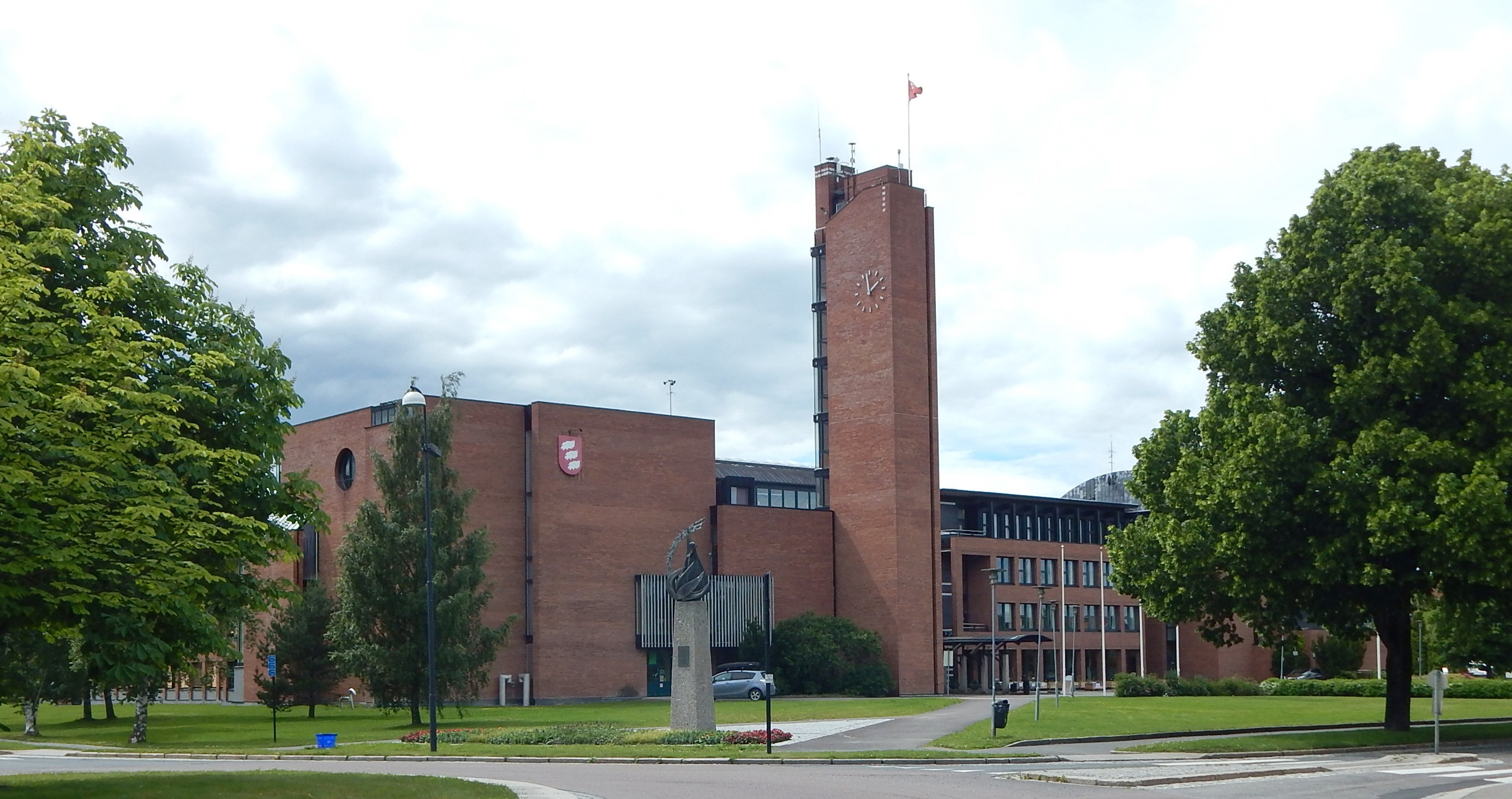 Skedsmo rådhus i Lillestrøm